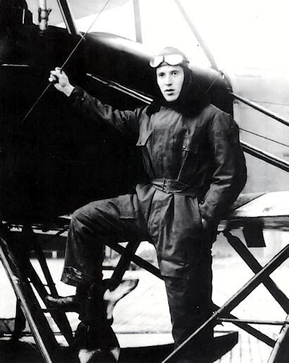 Luutnantti Allan Gottleben Ilmailipataljoonan FF 49C:n edessä.